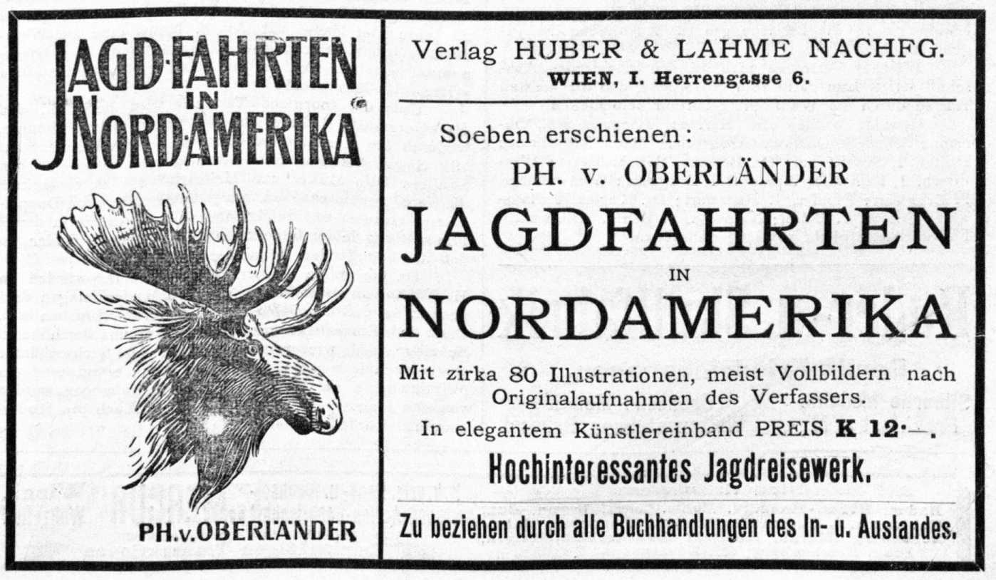 Inzerát knihy Jagdfahrten in Nordamerika. Otištěno na stránkách Allgemeine Sport-Zeitung v prosinci 1910.